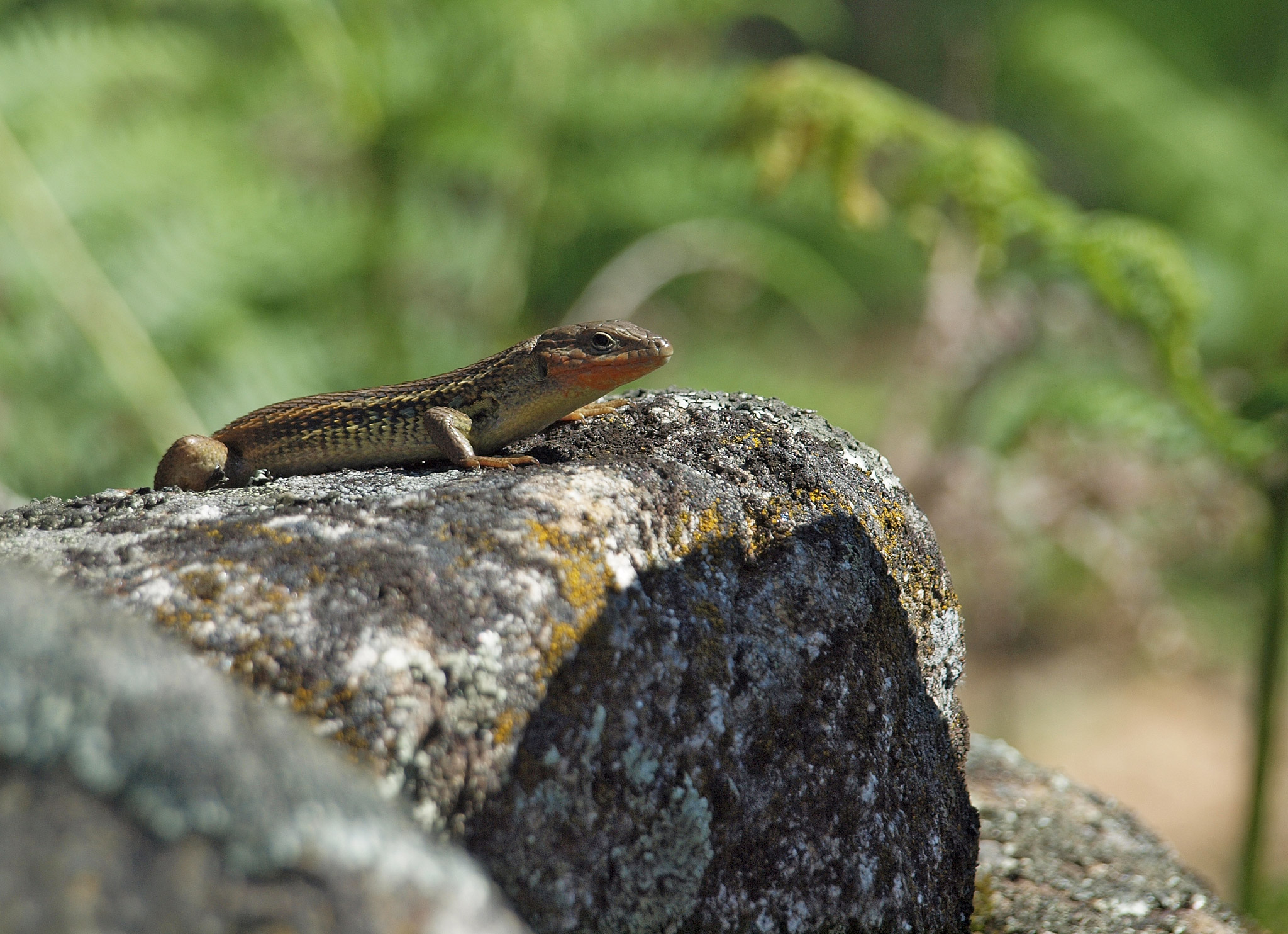 Lagartija colilarga (Psammodromus manuelae), macho. Losar de la Vera (Cáceres, España).